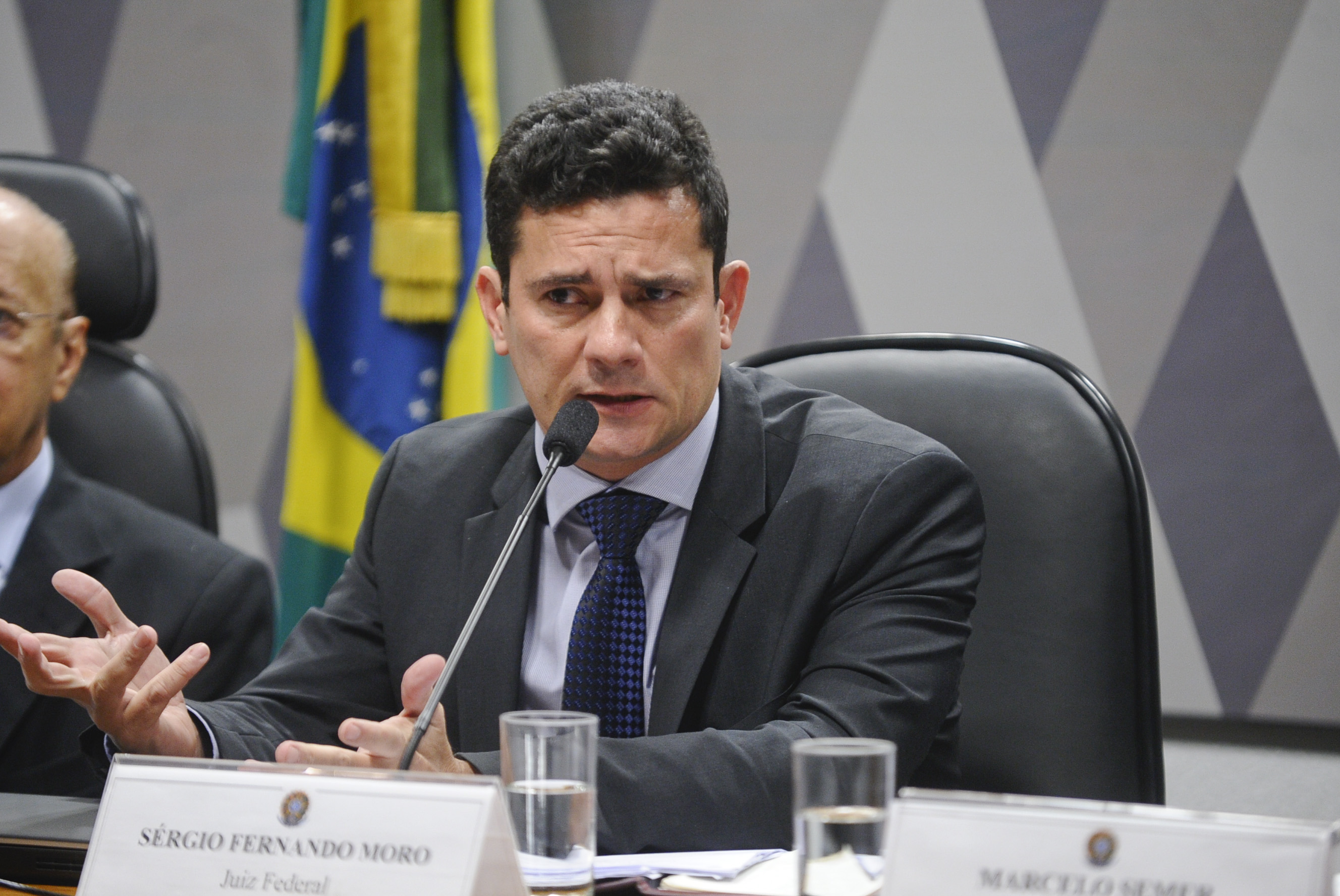 Comissão de Constituição, Justiça e Cidadania (CCJ) realiza audiência pública interativa para instruir o PLS 402/2015, que altera o Código de Processo Penal, em relação aos recursos. Em pronunciamento, juiz federal, Sérgio Fernando Moro. Foto: Marcos Oliveira/Agência Senado.